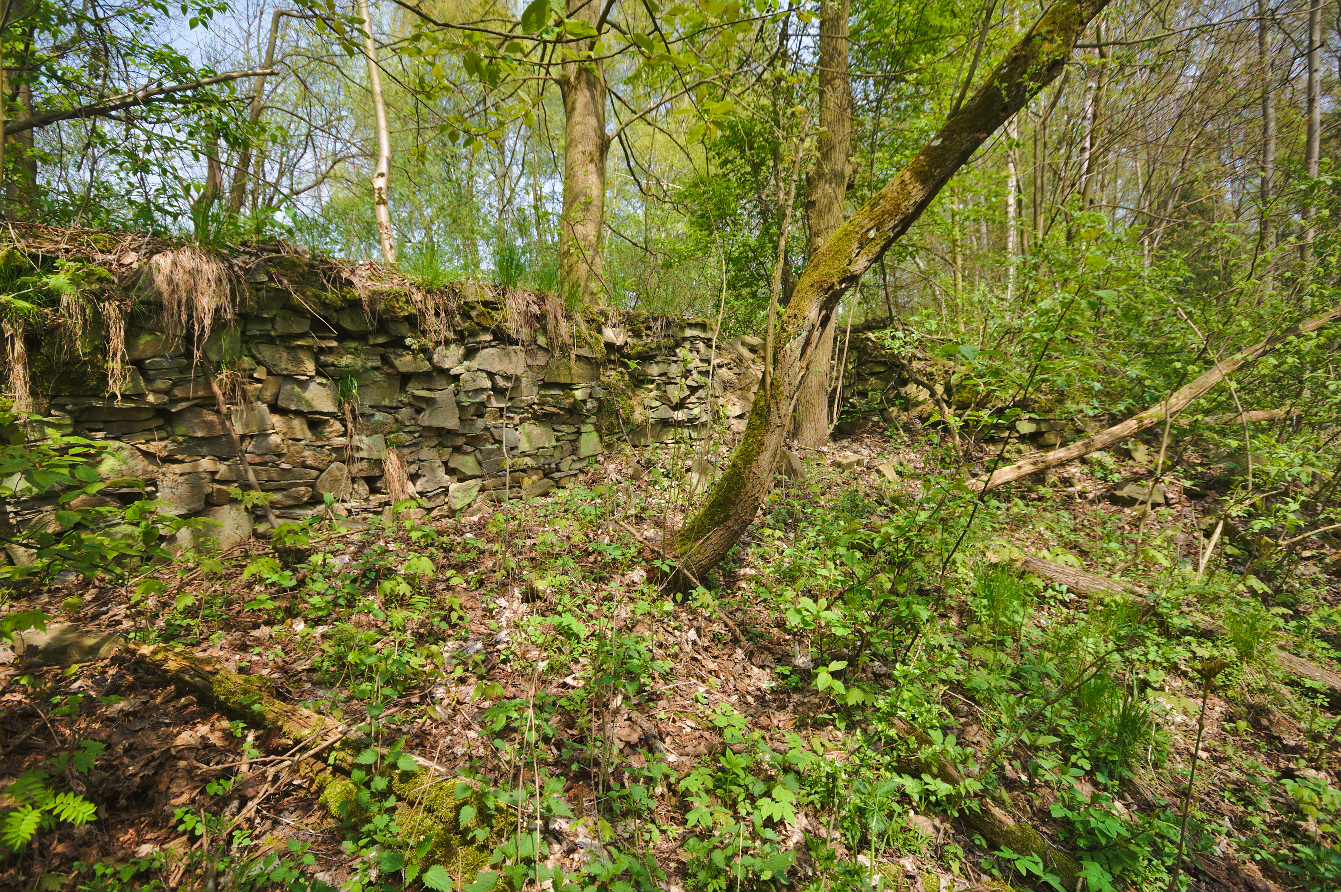 Zaniklá vesnice Bělá, katastr obce Heroltovice, Město Libavá, okres Olomouc